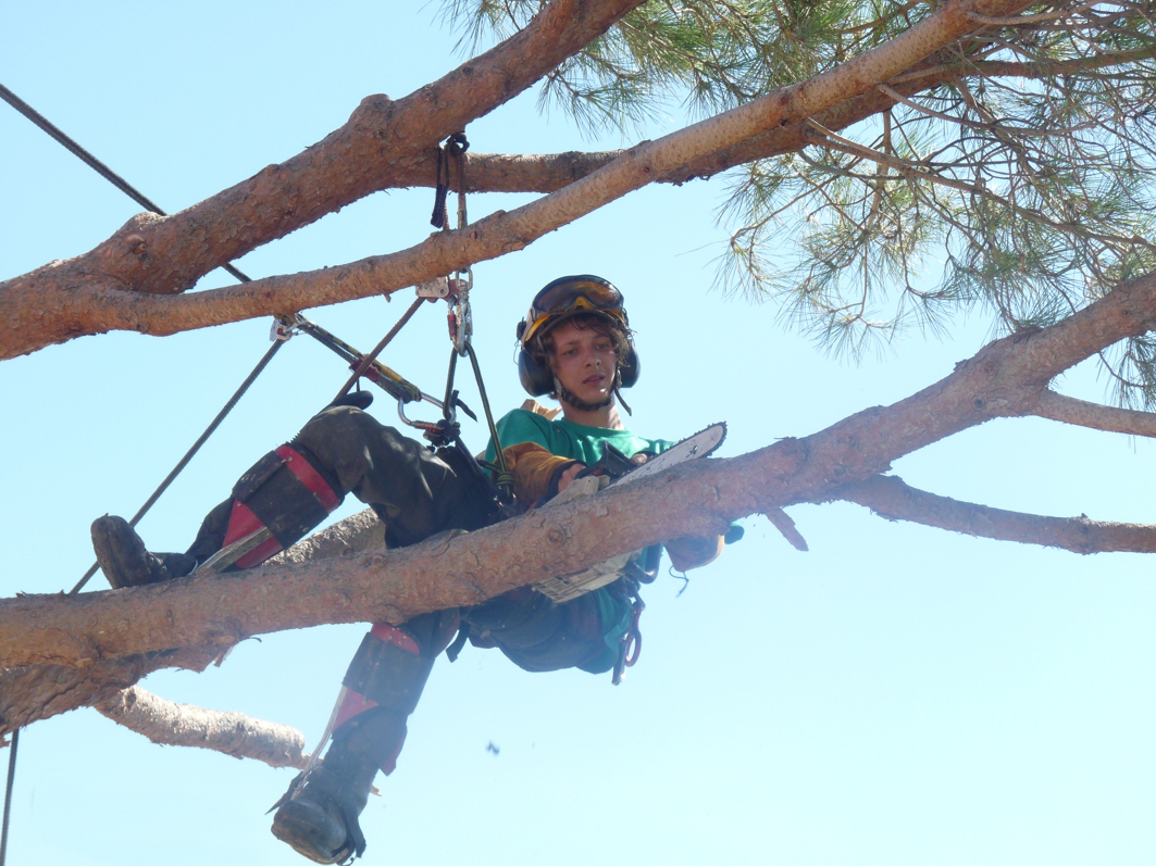 Démontage d'un pin en septembre 2011